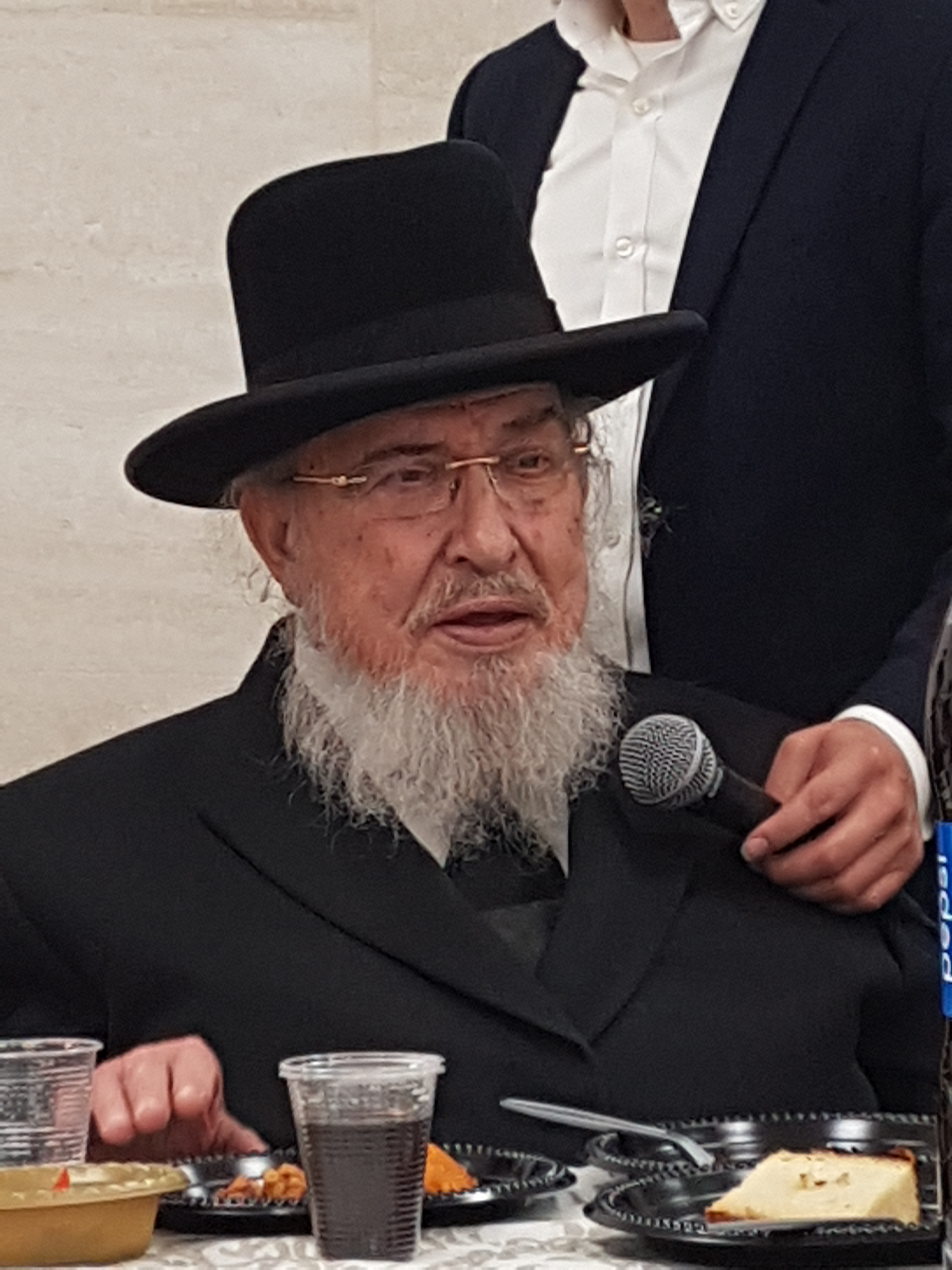 ראש ישיבת עטרת ישראל הרב ברוך מרדכי אזרחי, נושא דברים באירוע שבע ברכות